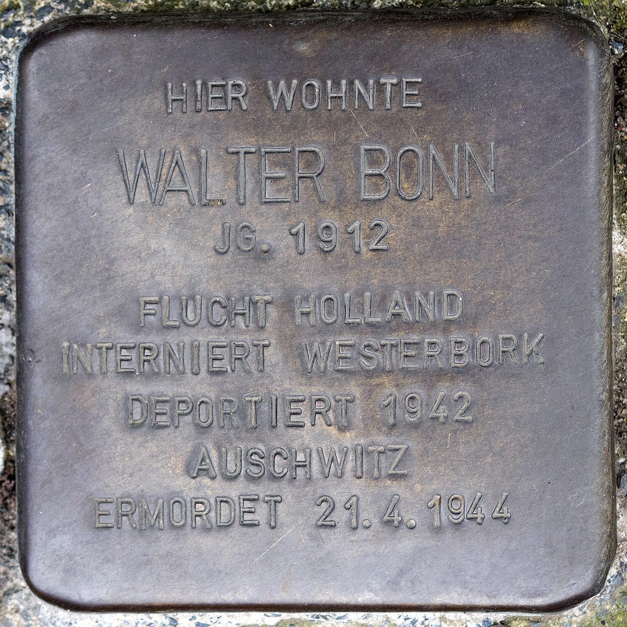 Stolpersteine Nettetal Bonn, Walter